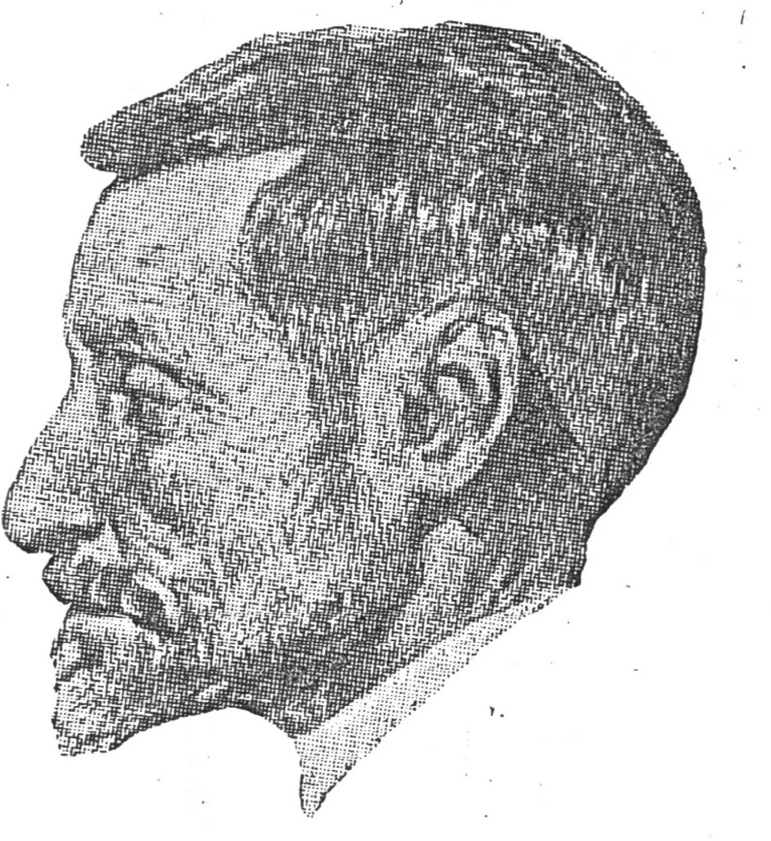 cara de Manuel Vieira Natividade